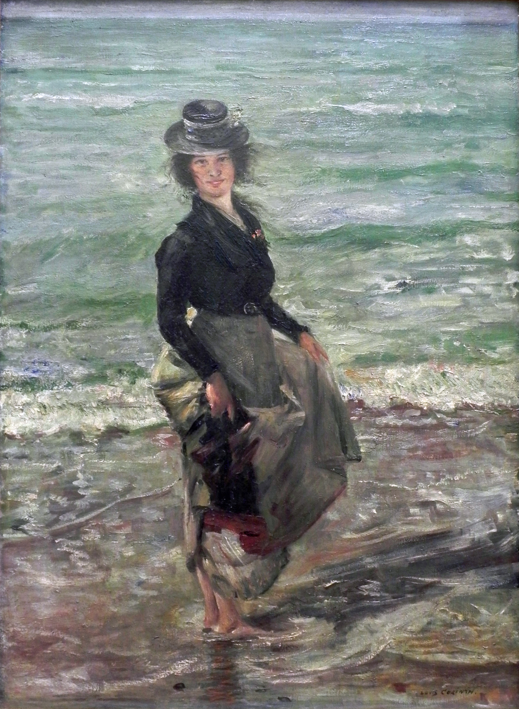 Eine frühe Darstellung seiner späteren Ehefrau Charlotte Berend-Corinth